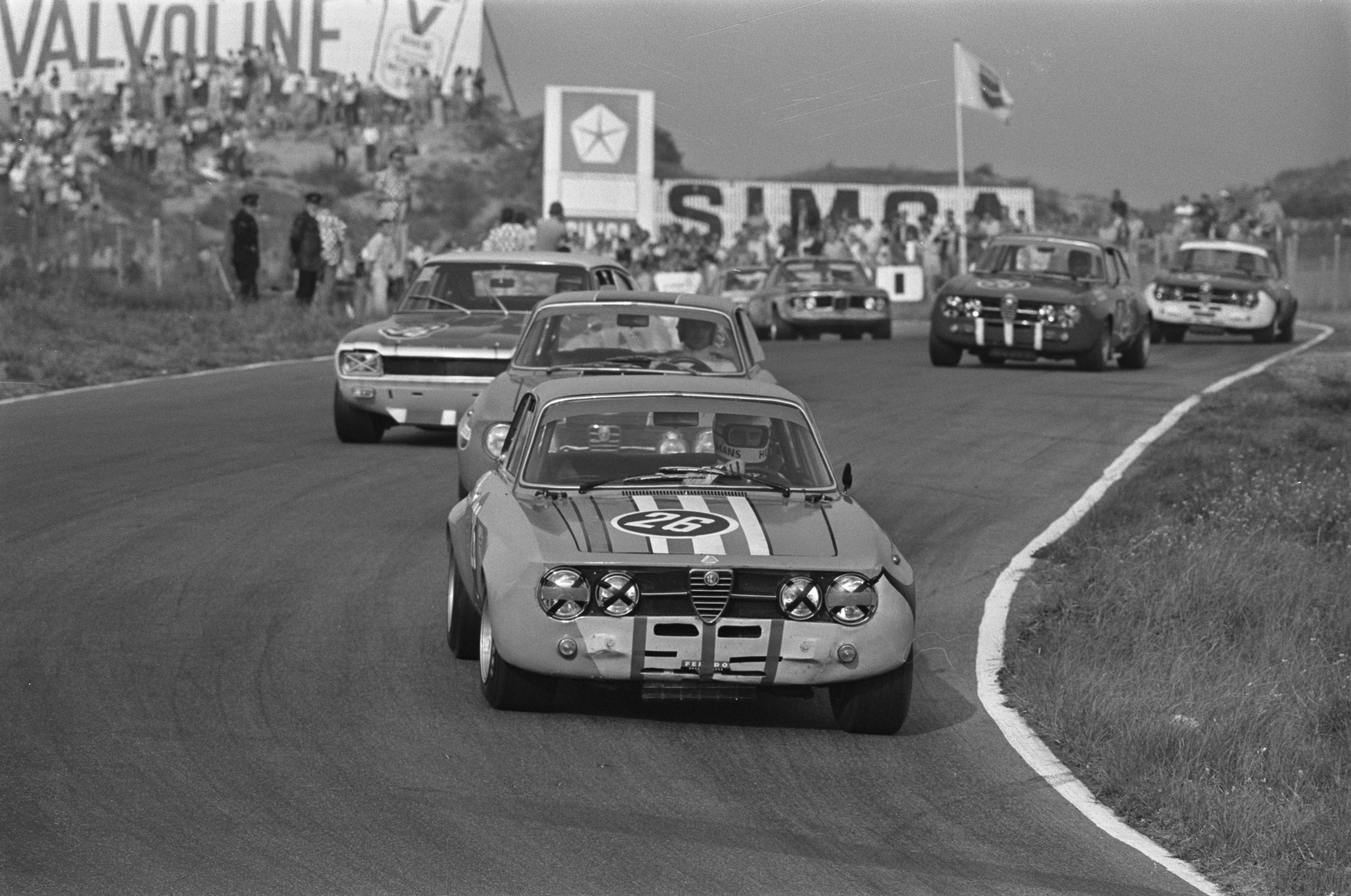 Collectie / Archief : Fotocollectie Anefo Reportage / Serie : [ onbekend ] Beschrijving : Autoraces op circuit Zandvoort, om Zandvoort Trophy ; race voor toerwagens groep-II: op kop nr. 26 T. Hezemans in Alfa Romeo Datum : 30 augustus 1970 Locatie : Noord-Holland, Zandvoort Trefwoorden : AUTORACES Persoonsnaam : Alfa Romeo, Hezemans, T. Fotograaf : Evers, Joost / Anefo Auteursrechthebbende : Nationaal Archief Materiaalsoort : Negatief (zwart/wit) Nummer archiefinventaris : bekijk toegang 2.24.01.05 Bestanddeelnummer : 923-7927